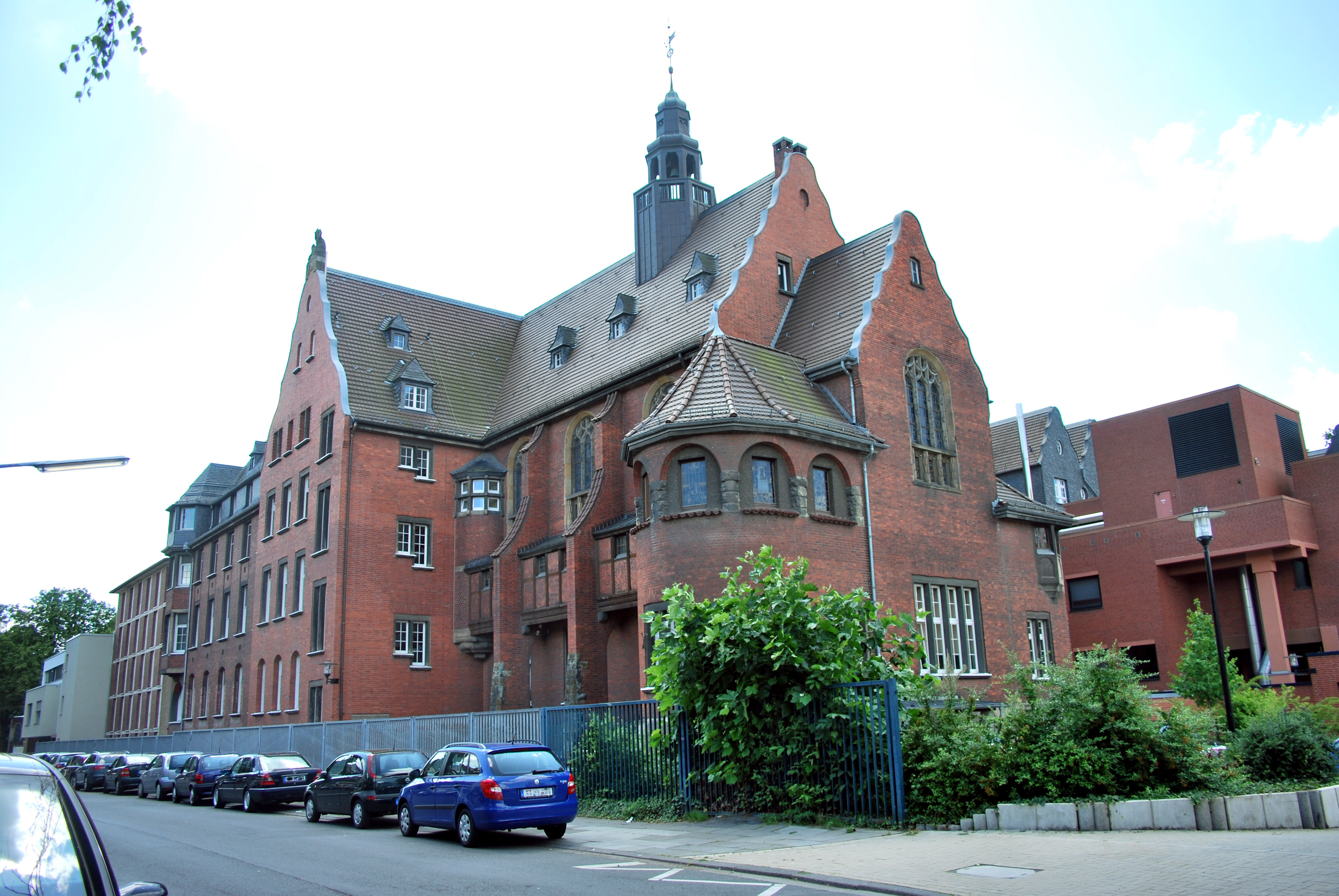 St.-Antonius-Krankenhaus mit Kapelle in Köln-Bayenthal This is a photograph of an architectural monument.